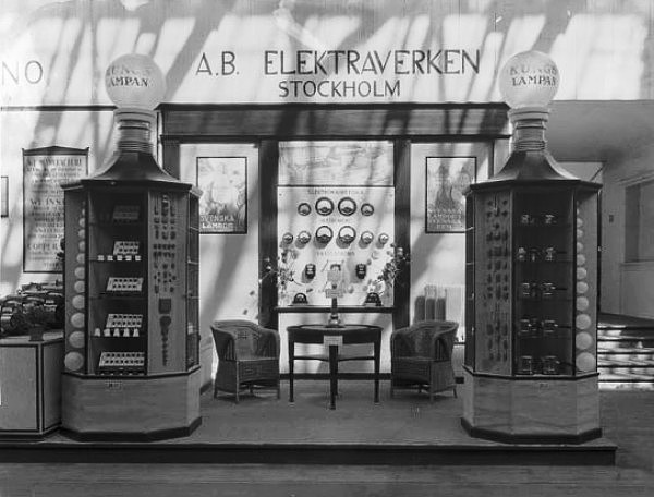 Jubileumsutställningen 1923. Firmautställning: Elektraverken AB, Stockholm.